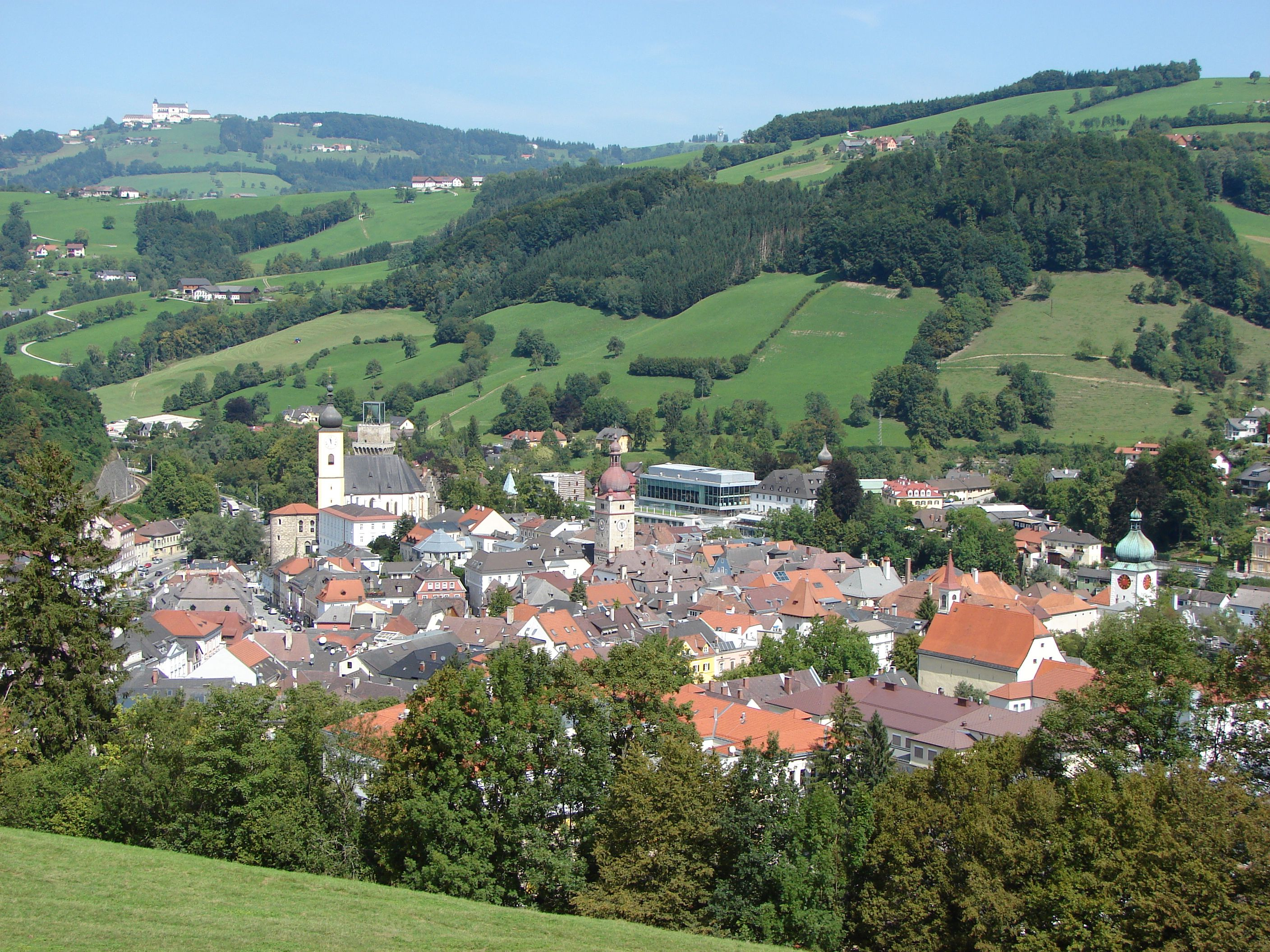 Waidhofen an der Ybbs vom Buchenberg aus gesehen. Im Hintergrund links oben die Basilika Sonntagberg.